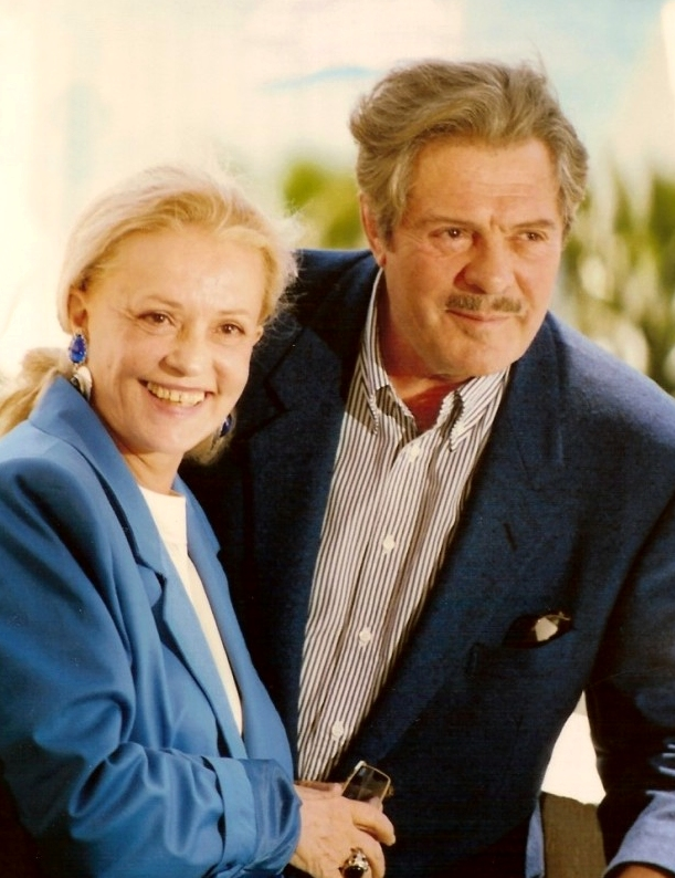 Jeanne Moreau et Marcello Mastroianni lors de la présentation du film "Le Pas suspendu de la cicogne" au festival de Cannes.